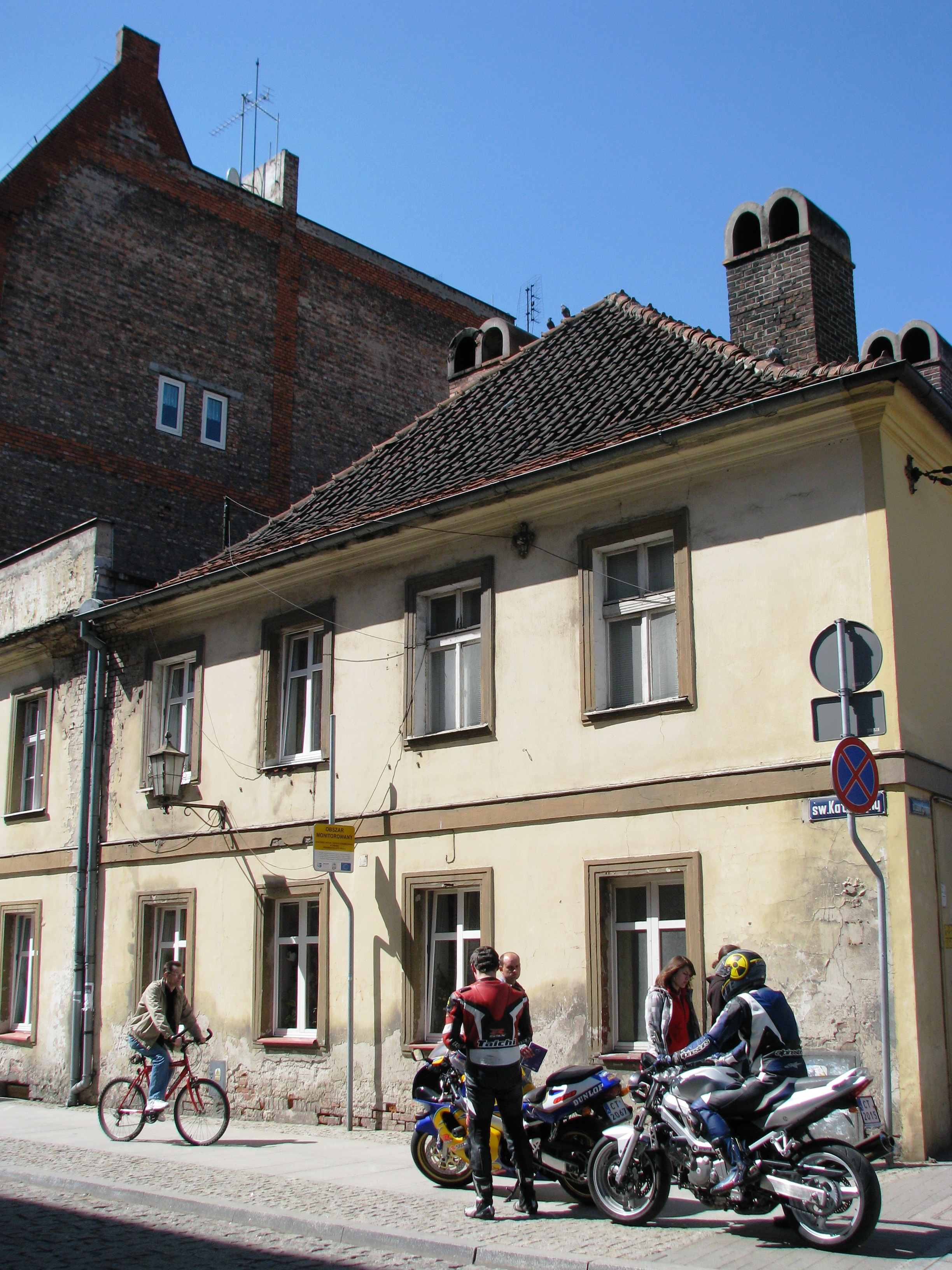 Toruń, ul. Świętej Katarzyny 2 - dawny przytułek dla ubogich (Elenden Haus, szpital św. Katarzyny), obecnie dom mieszkalny, XV w., ok. 1836, 1860 (zabytek ne A/909)